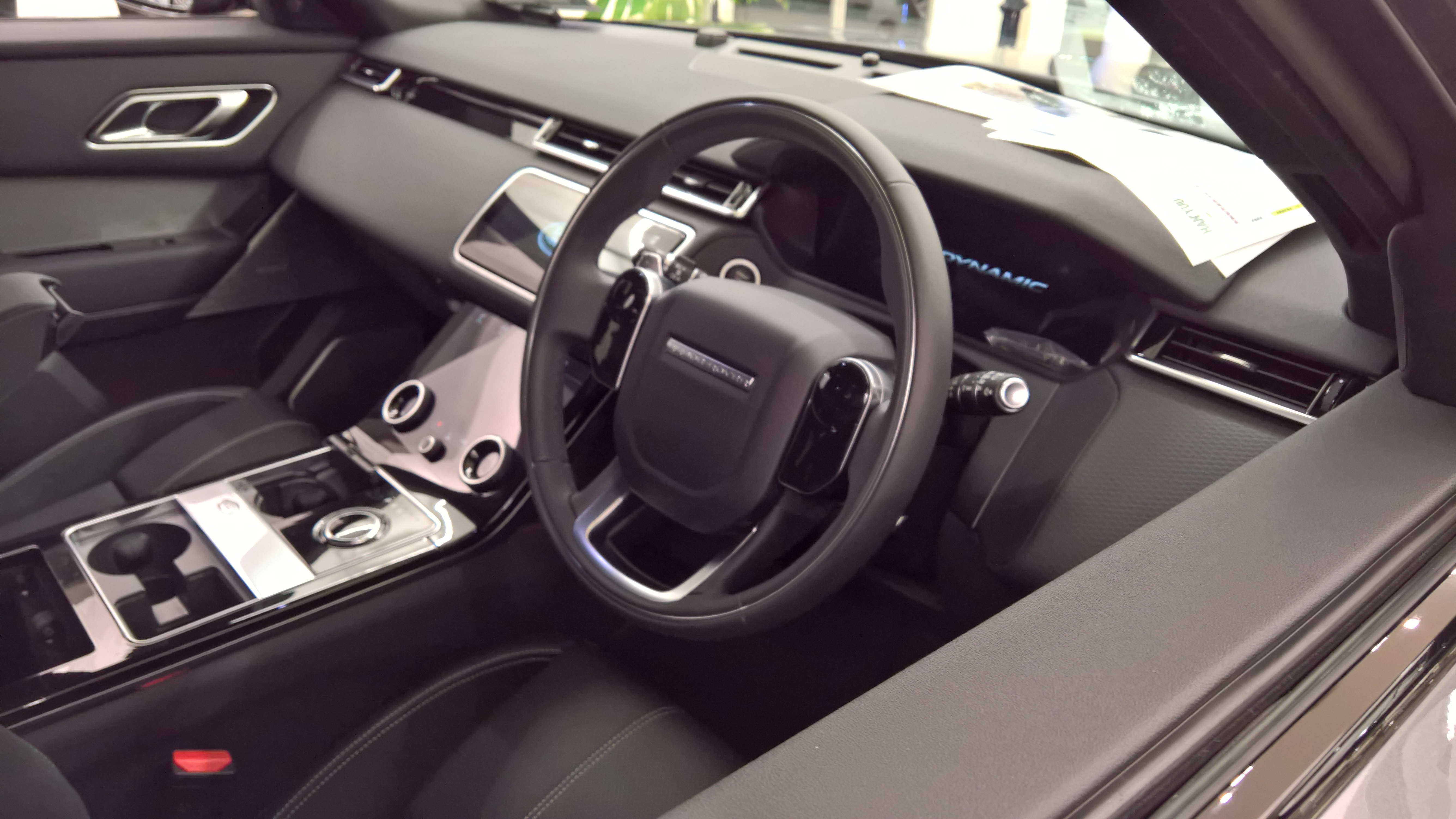 レンジローバー・ヴェラール R-DYNAMIC